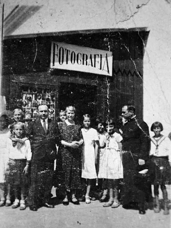 Fotograf żydowski przy ul. Ogrodowej w Szydłowcu - lata 20. xx w.